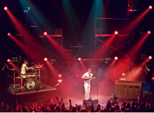 Josh Dun à la batterie Tyler Joseph au micro